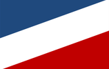 제3-4공화국의 신민당과 제5공화국의 신한민주당이 사용한 당기 당시 기사 및 뉴스를 바탕으로 만듬